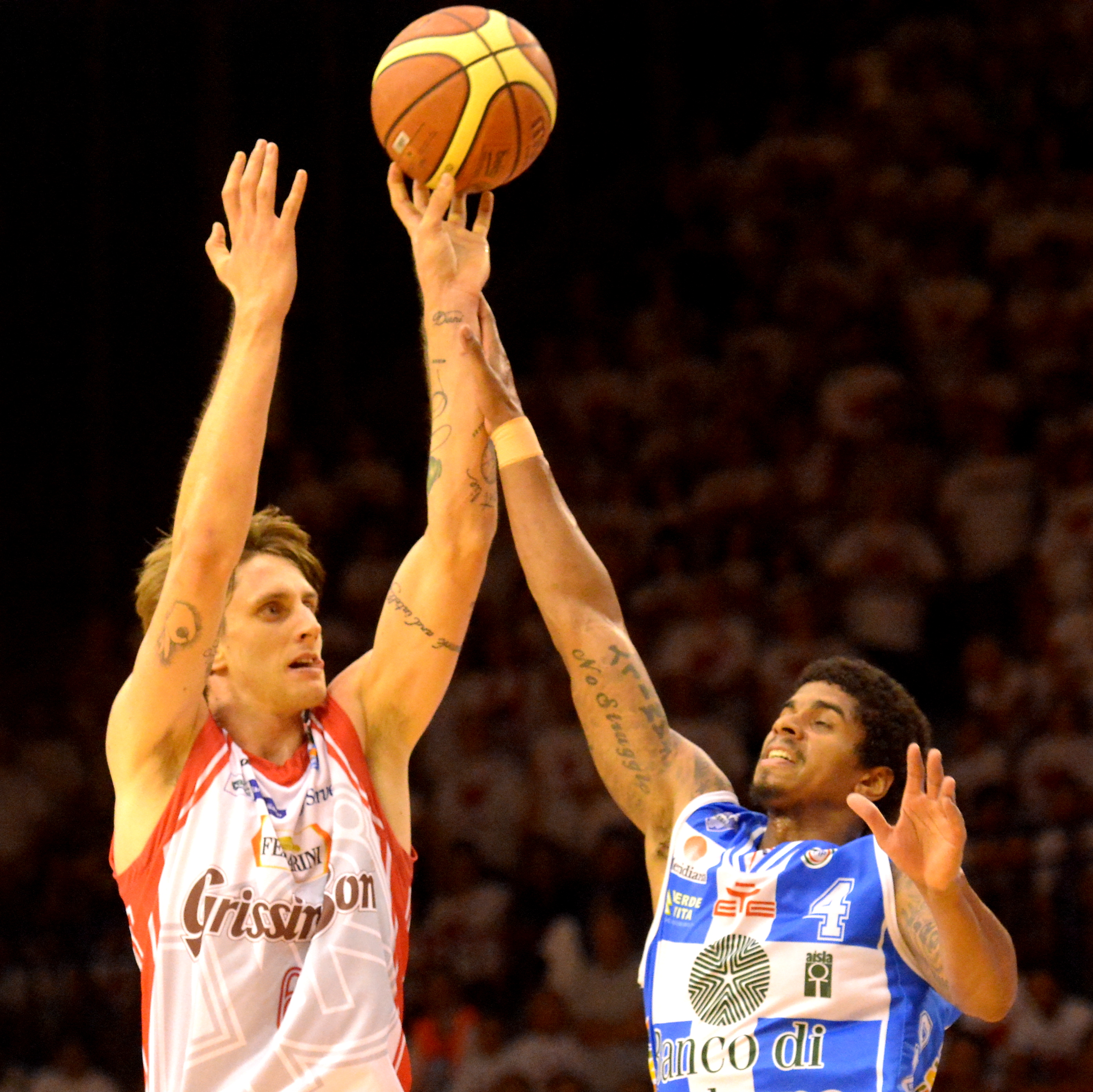 Achille Polonara al tiro nella finale dei play-off del campionato di serie A 2014/2015